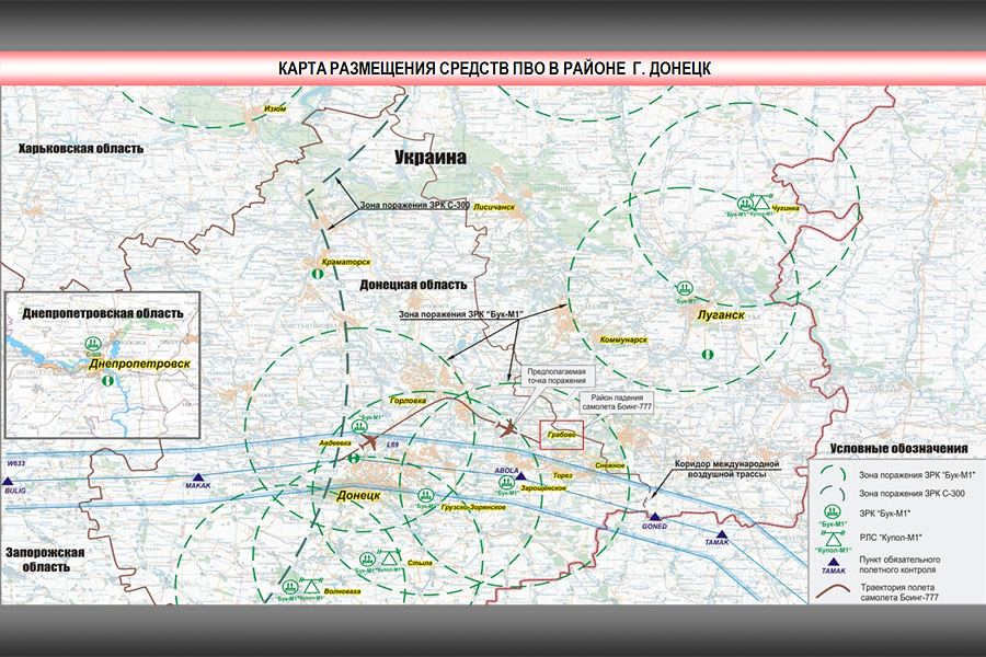 Карта размещения средств ПВО в районе города Донецк в день катастрофы рейса MH17.